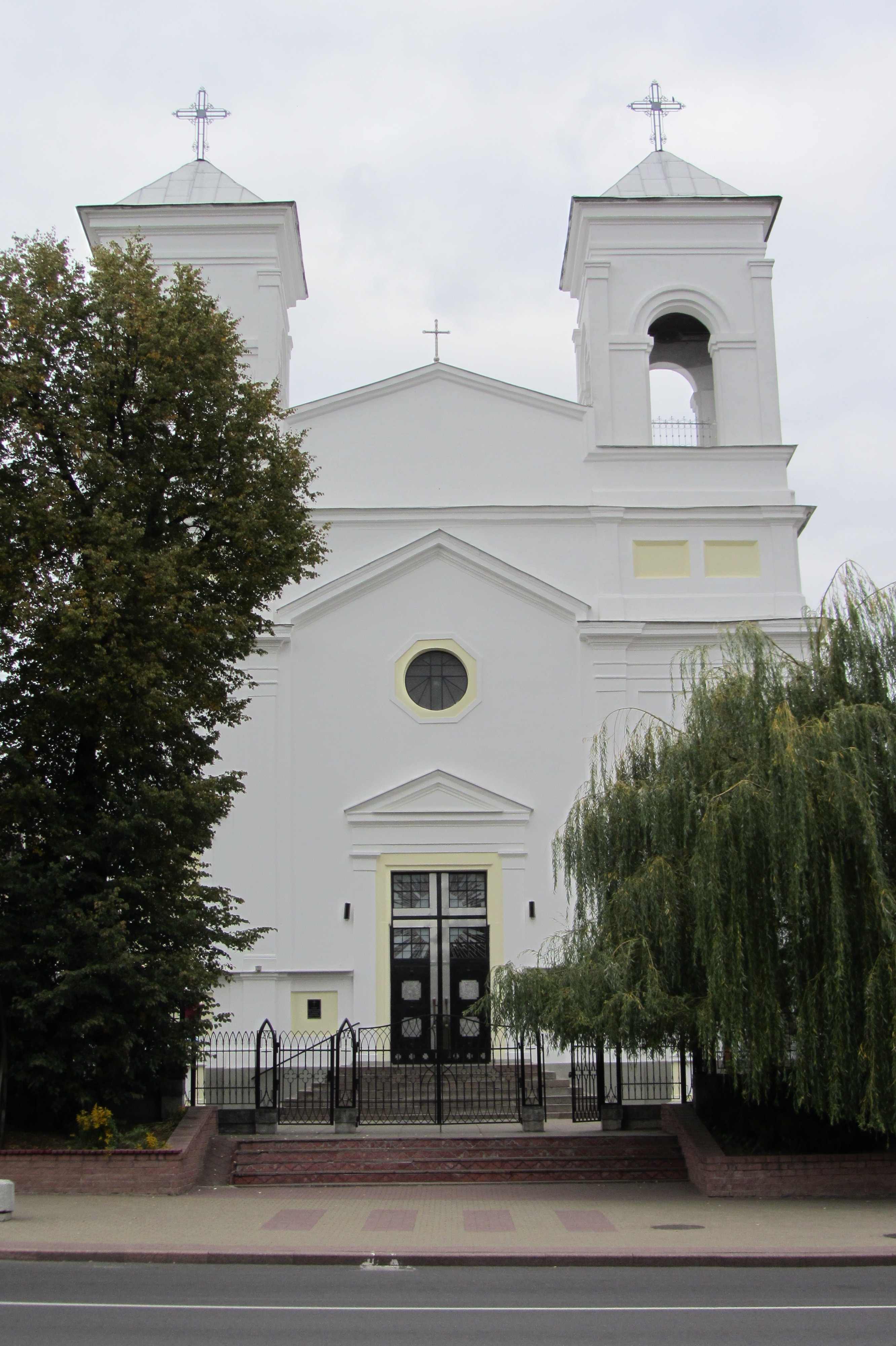 Беларуская (тарашкевіца): Катэдральны касьцёл Сьвятога Крыжа. г. Берасьце This is a photo of Belarusian heritage monument. Reference number: 113Г000015 ( WLM)